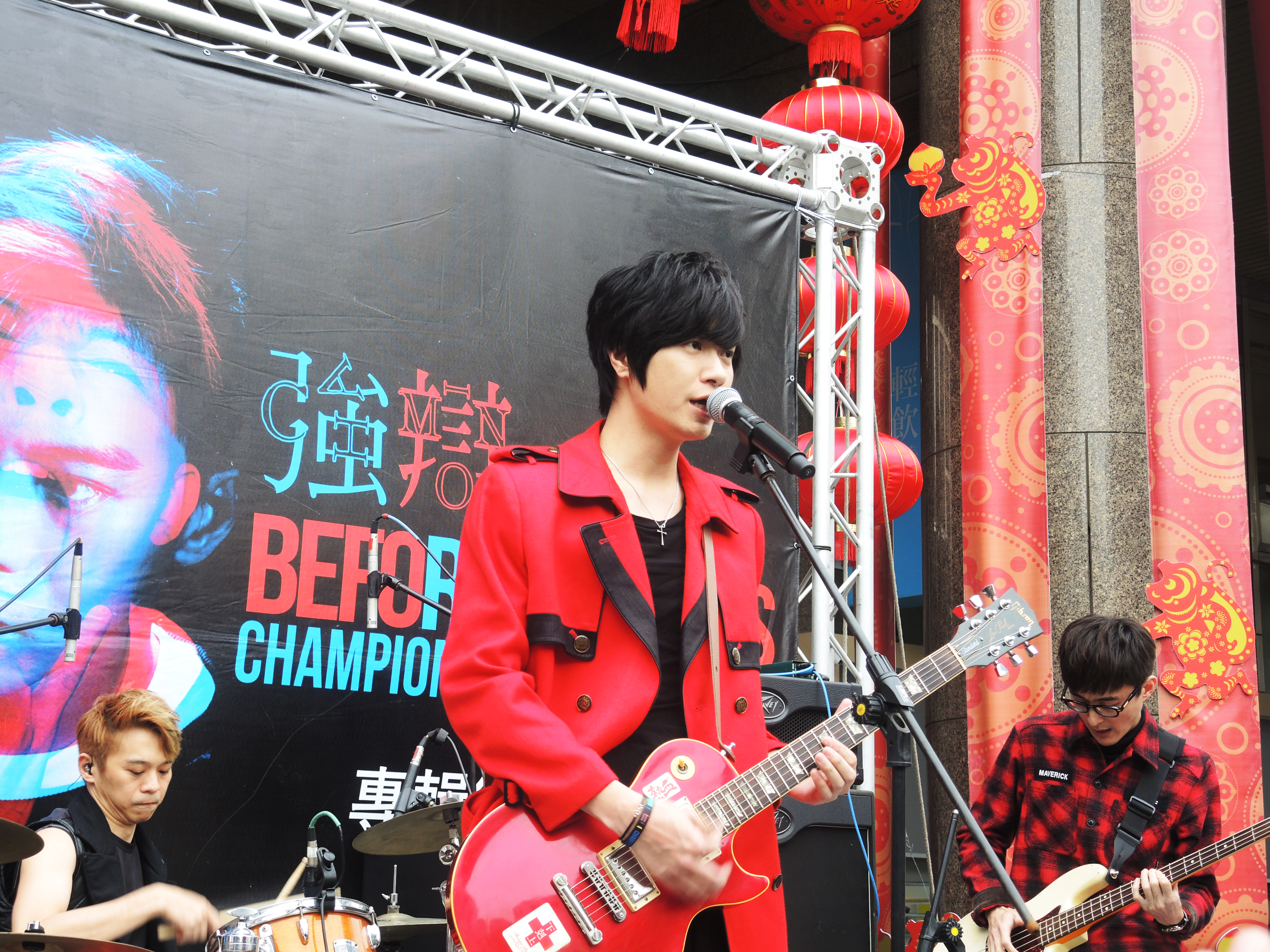 強辯樂團《在那之前》專輯簽唱會台中場